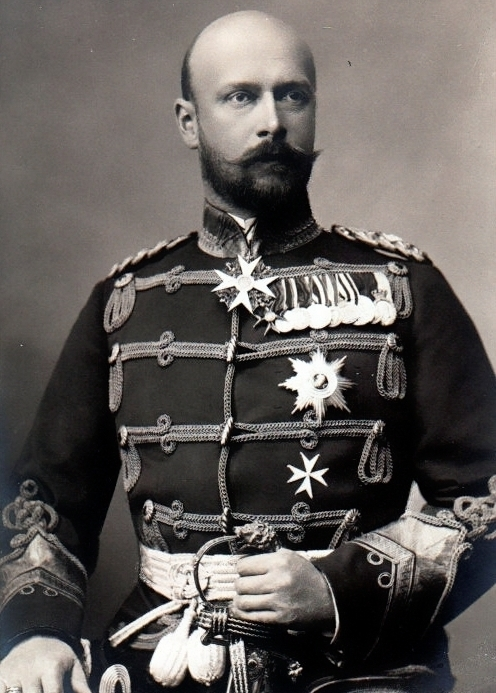 Herzog Johann Albrecht von Mecklenburg in der Uniform des Preussischen Leib-Garde-Husarenregiments